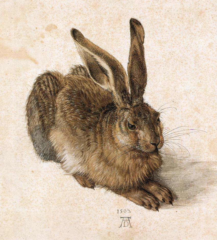 Dürers Feldhase ist nicht nur seine berühmteste Naturstudie und ein erster Höhepunkt der Naturbeobachtung in der abendländischen Kunst, sondern auch ist das Herzstück der Albertina. Unter all seinen Zeichnungen sollte das „Häslein“ die glanzvollste Karriere machen. Mit differenzierter Pinselführung hat Dürer in Aquarell- und Deckfarben das weiche, längere Haarkleid an Bauch und Schenkeln sowie das Kurzhaar am Rücken des etwa zweijährigen Tieres festgehalten und mit Deckweiß einzelne Haare, ja selbst die Tasthaare an der Schnauze, die Vibrissen, und das farblich ausgeprägte Fell mit dem schwarzen Pinsel herausgearbeitet. Das Tier wurde von vorn und in leichter Aufsicht gemalt; die wachsamen Augen und die hoch aufgerichteten Ohren des Hasen machen den Eindruck, als würde er aus dem ruhigen Verharren aufspringen und flüchten wollen. Das sich im rechten Auge des Hasen spiegelnde Fensterkreuz ist ein weiterer Realitätsbezug dieser Tierstudie - und vielleicht ein Hinweis auf eine Ausführung im Atelier des Künstlers; gleichzeitig könnte es aber auch auf eine christliche Symbolik anspielen und die Naturstudie mit einer religiösen Bedeutung versehen.